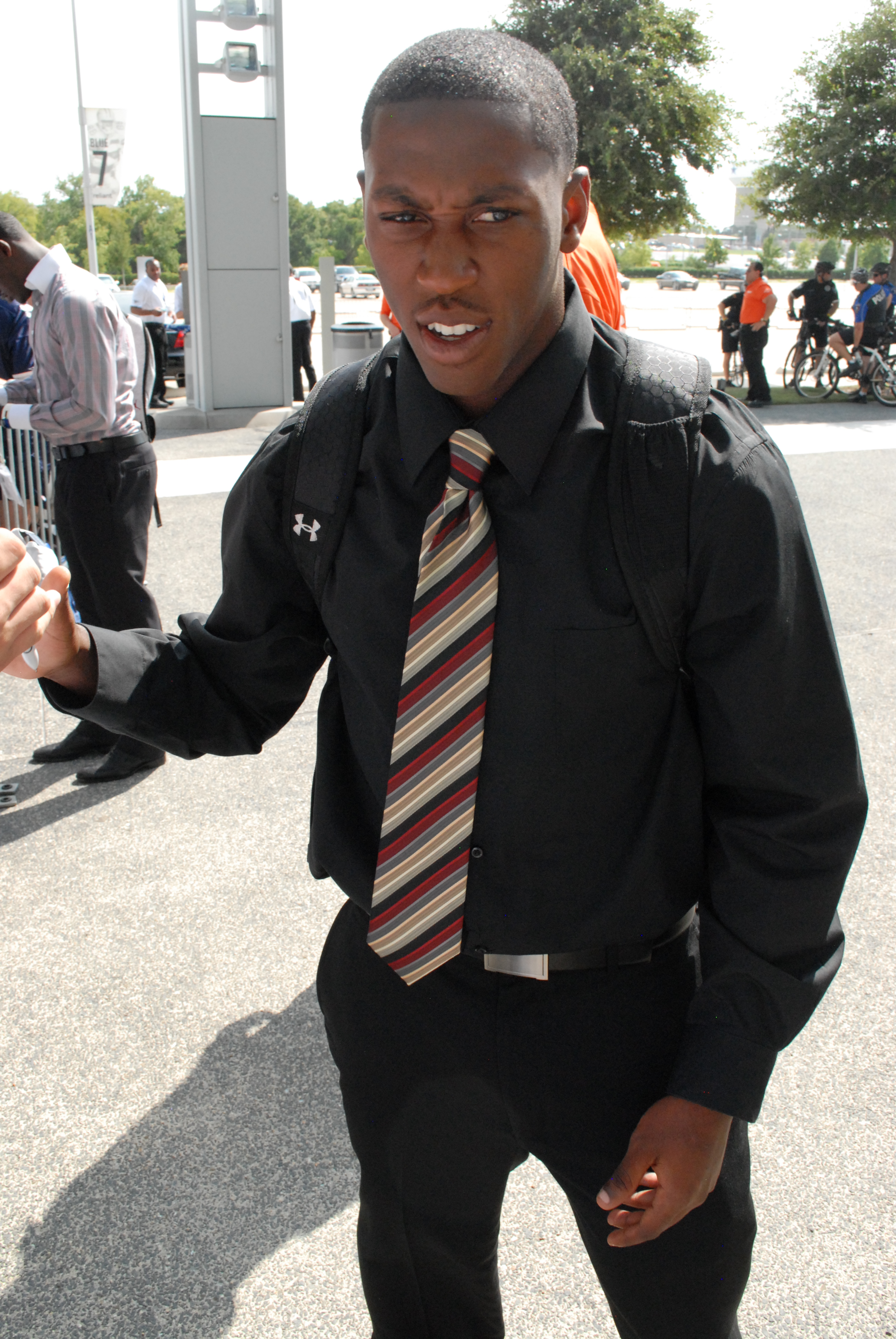 Lance Dunbar in 2012.